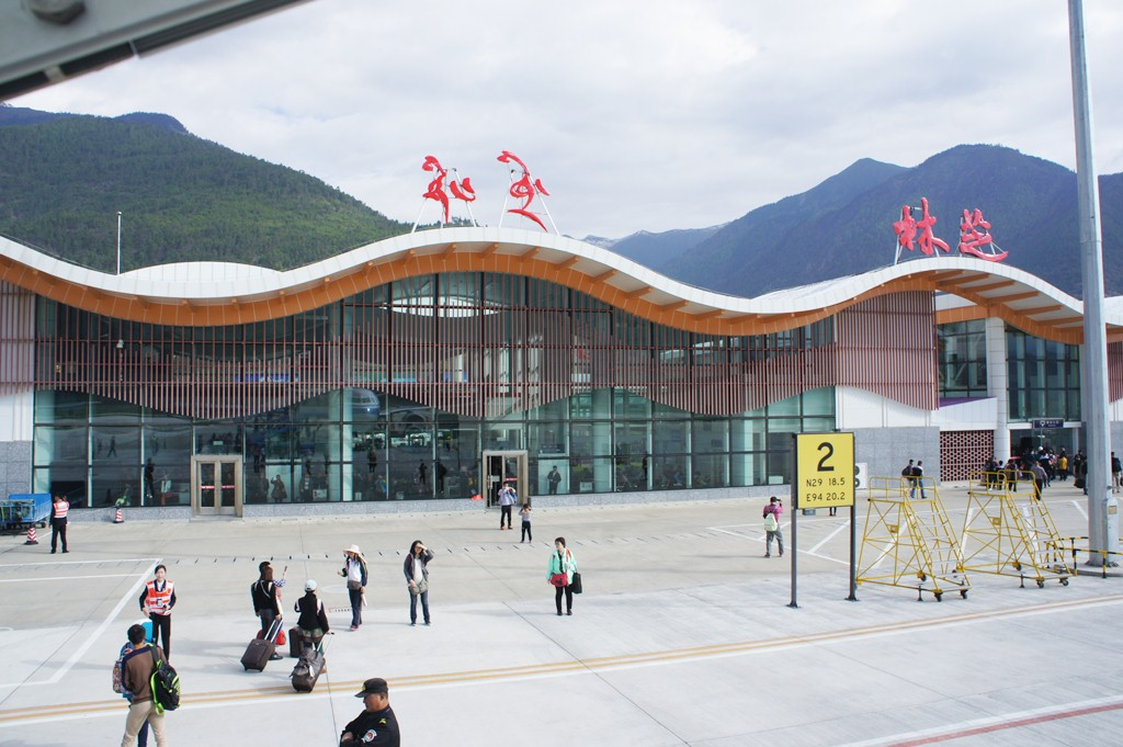 海拔:2850M